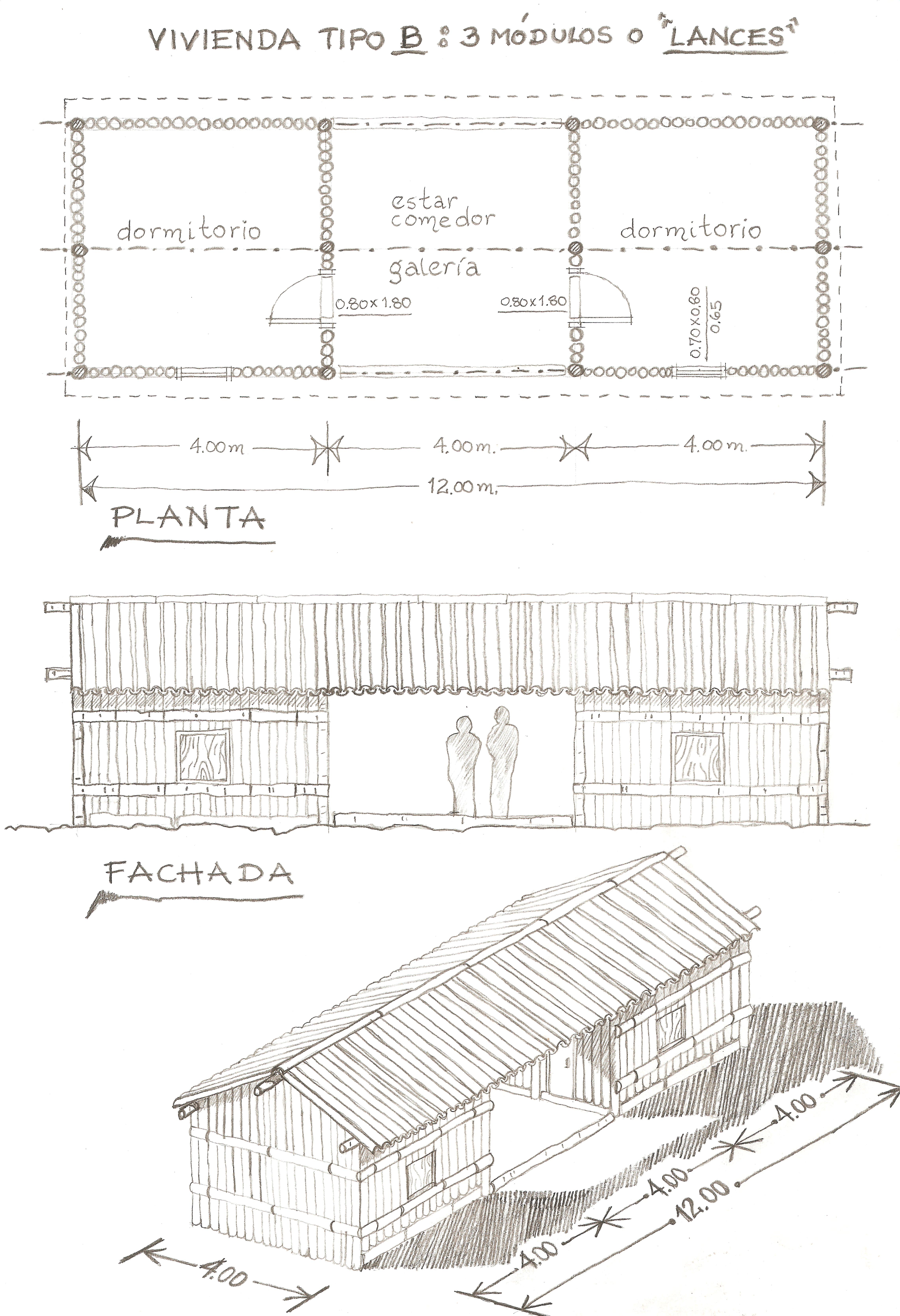 Vivienda hecha con madera de Karanda'y con la tipología de "Kulata Jovai", en la localidad de CEIBO, distrito de Puerto Pinasco, en el Chaco Paraguayo.